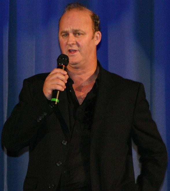 Tim McInnerny